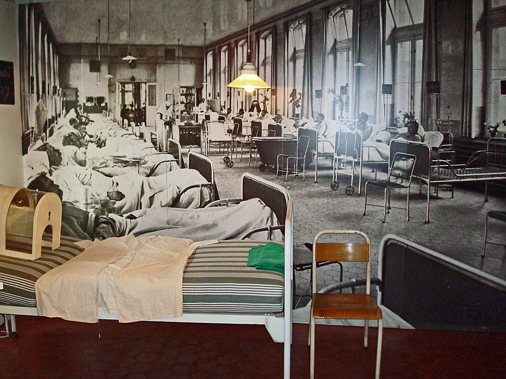 Medizinhistorische Abteilung im Stadtmuseum Gütersloh: historischer Krankensaal